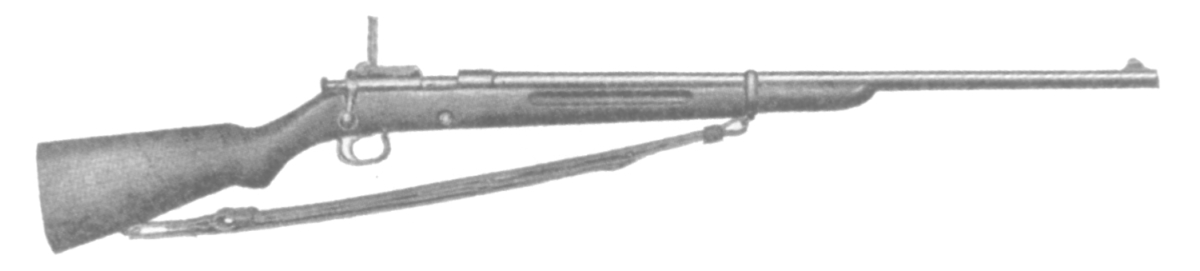 Winchester Model 52 target rifle, original version